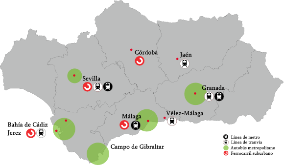 Mapa de las ciudades de Andalucía con el tipo de transporte urbano y metropolitano que disponen.